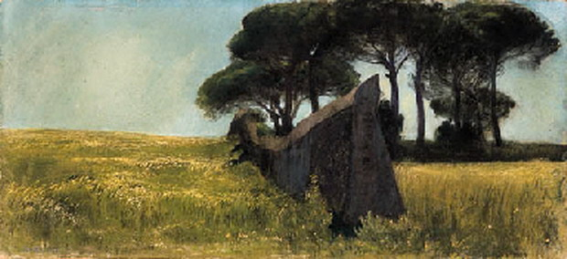 Пейзаж із диким полем і декількома деревами у римській кампаньї